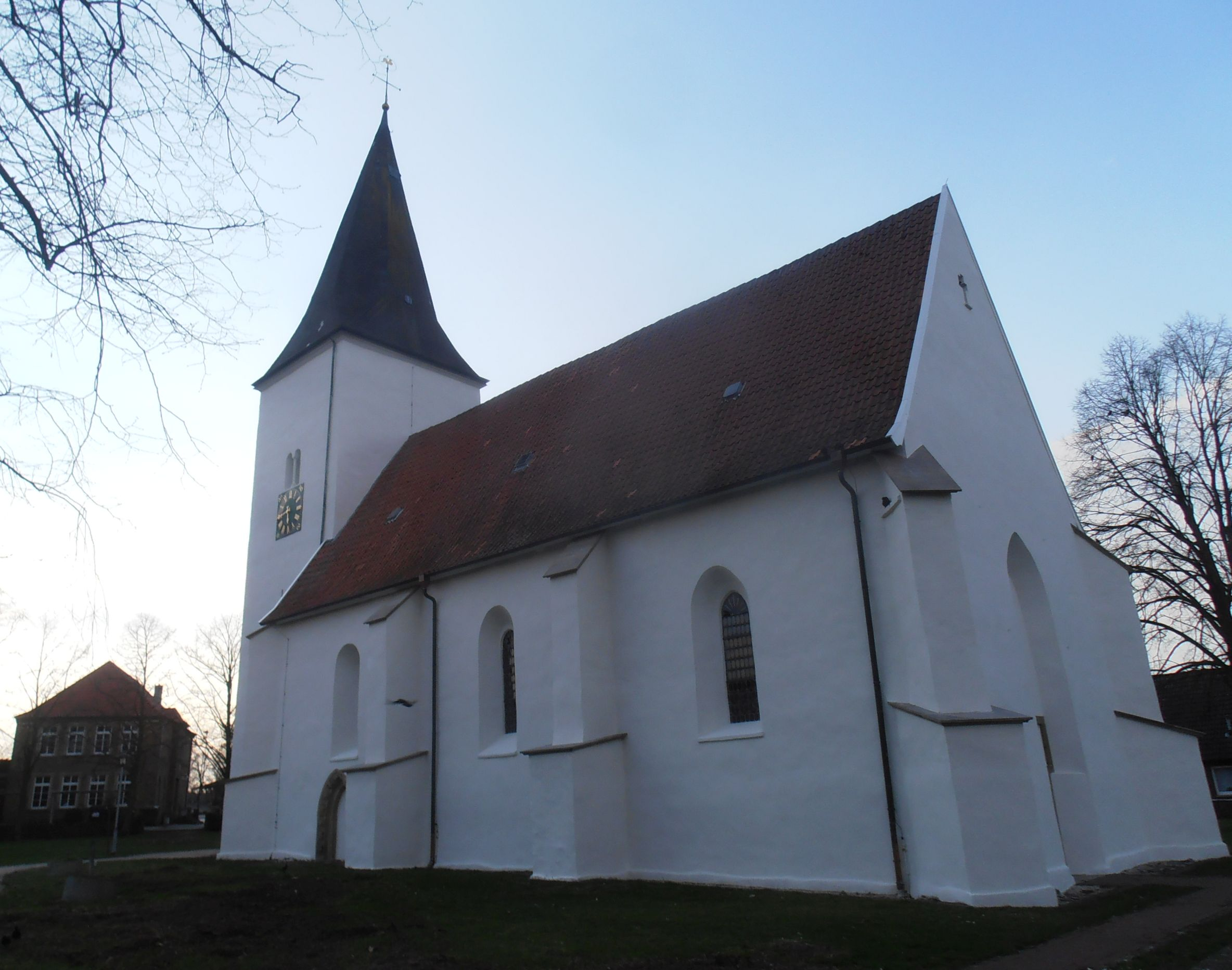 Die Marienkirche in Ueffeln im Norden des Landkreises Osnabrück in Niedersachsen; Blick von SO